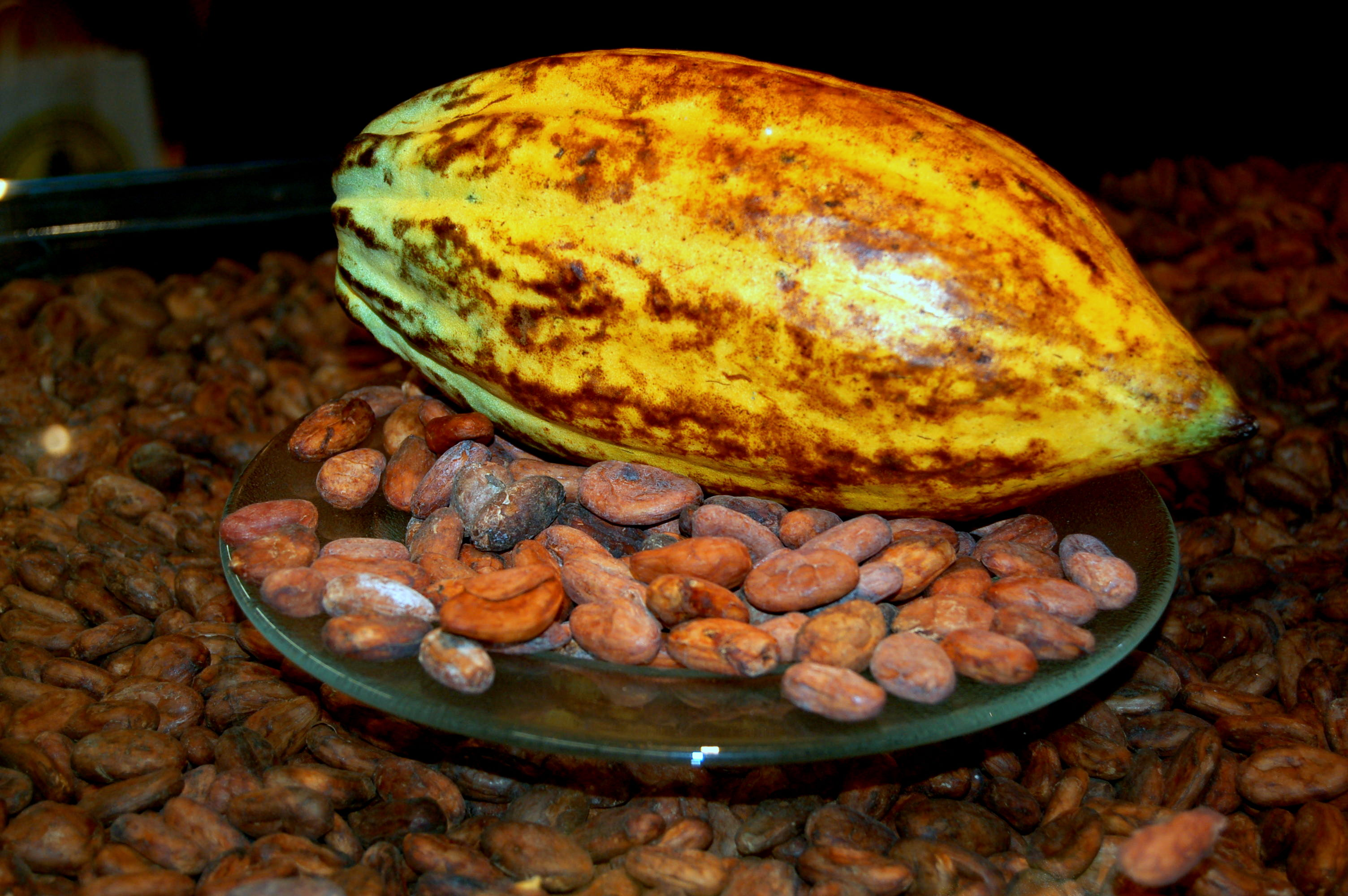 Kakaofrucht mit Kakaobohnen